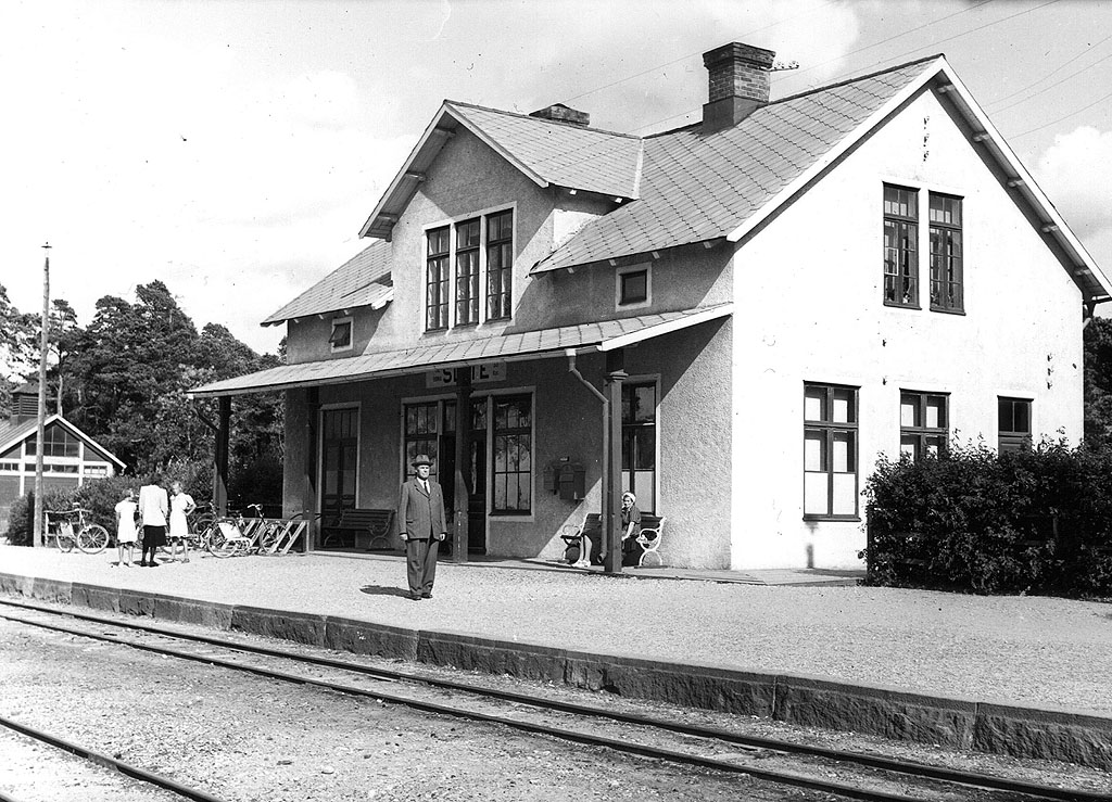 Slite station i det nyare utförandet